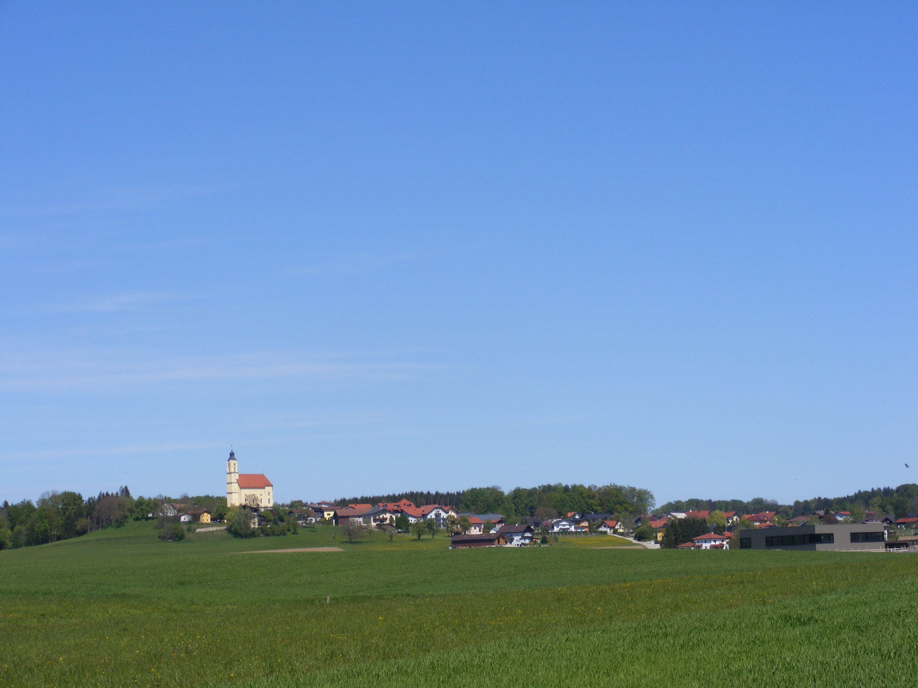 Moosdorf, Bezirk Braunau, Oberösterreich - Ansicht von Süden